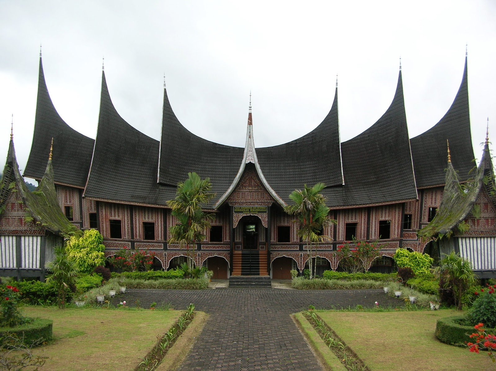 Rumah gadang warisan tak benda